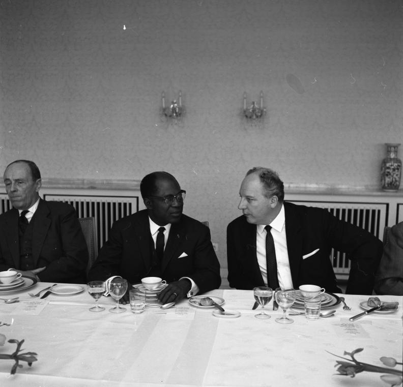 Besuch des Außenminister von Gabun, Jean Hilaire Aubamé und Wirtschaftsminister Gustave Auguilé, Empfang durch BM Scheel im Königshof, Bonn